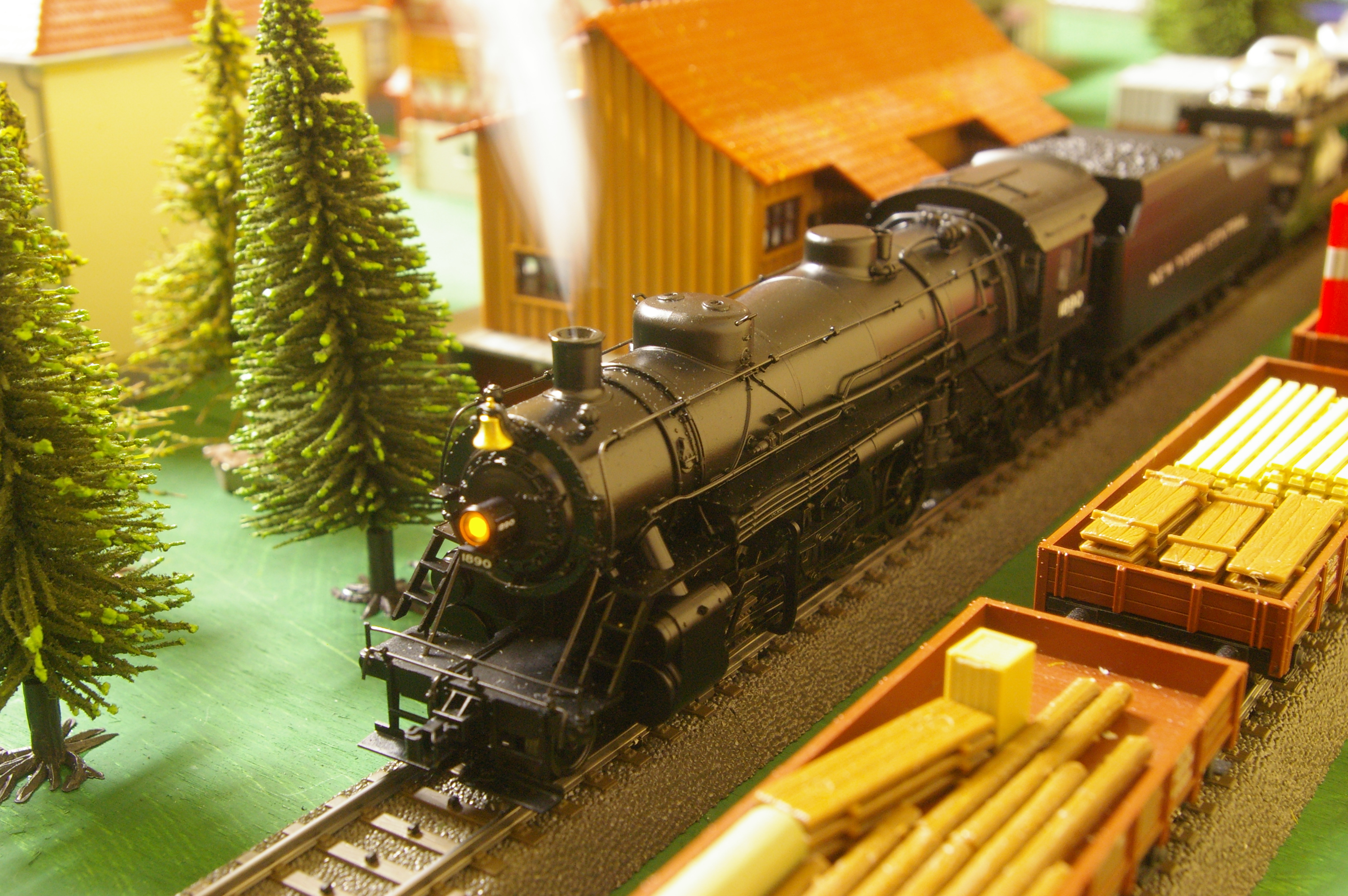 MÄRKLIN 37970 MIKADO NYC mit Rauchsatz